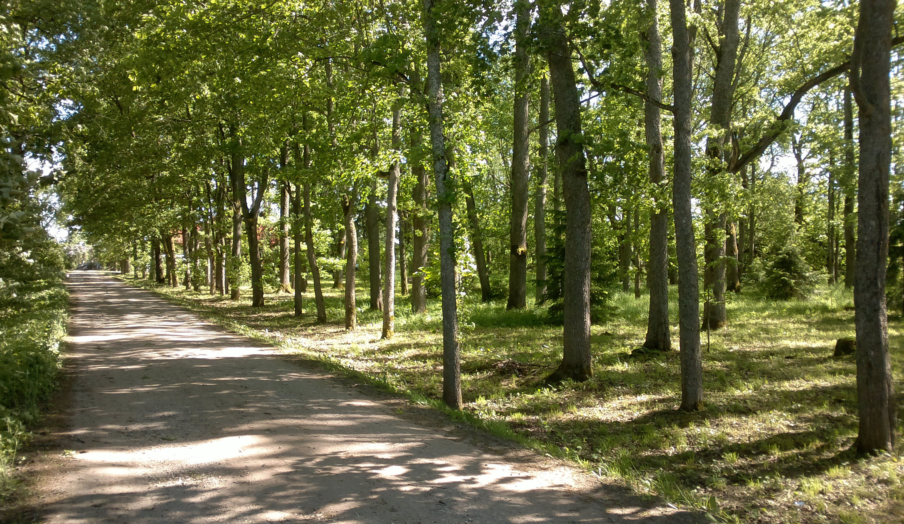 Sikana talupark